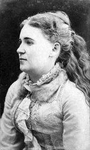 Fotografía de Marieta de Veintimilla con una edad alrededor de los 30 años o más; posiblemente durante su estadía en Perú.